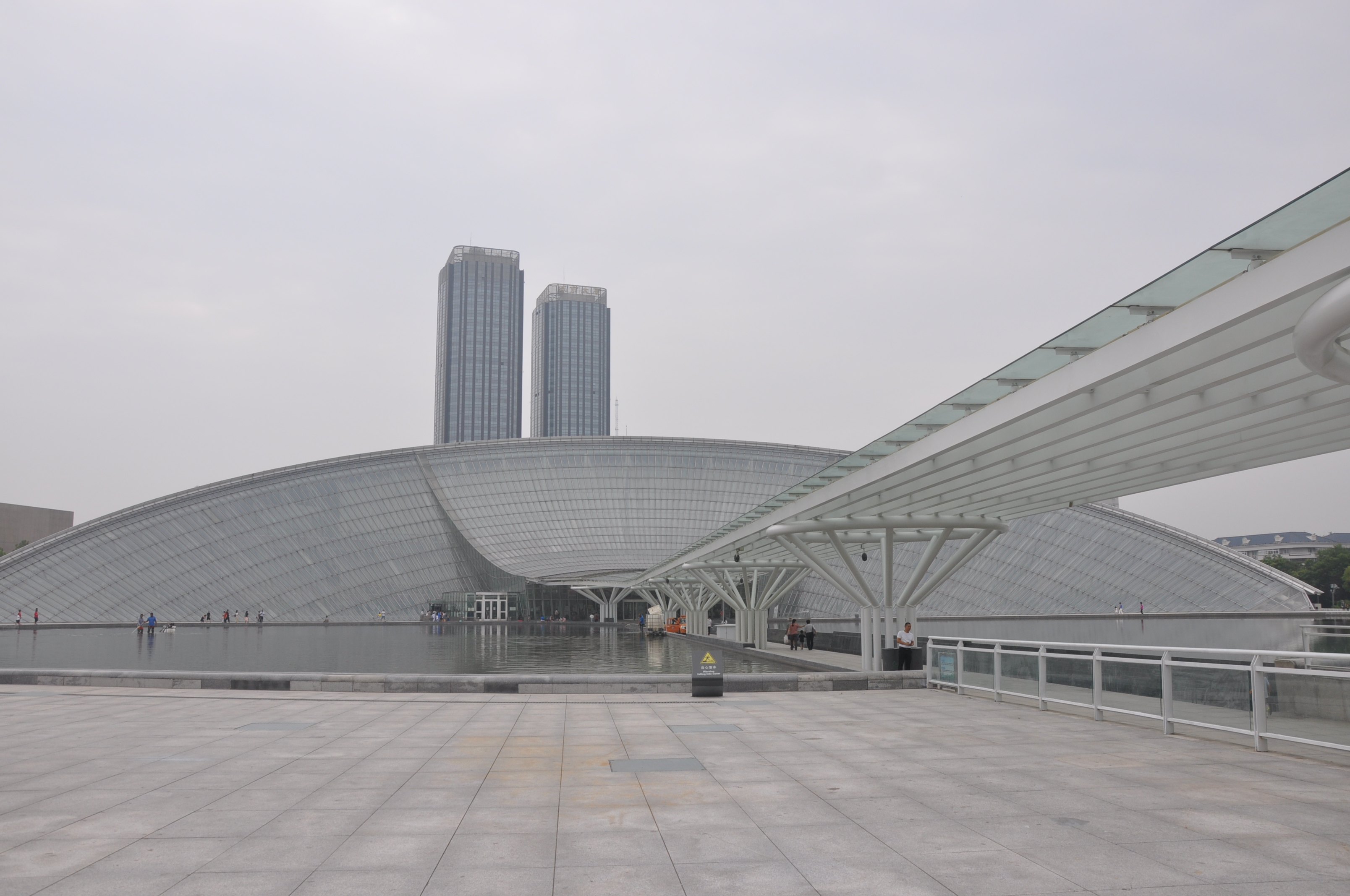 中文（中国大陆）: 文化广场时期天津自然博物馆正面